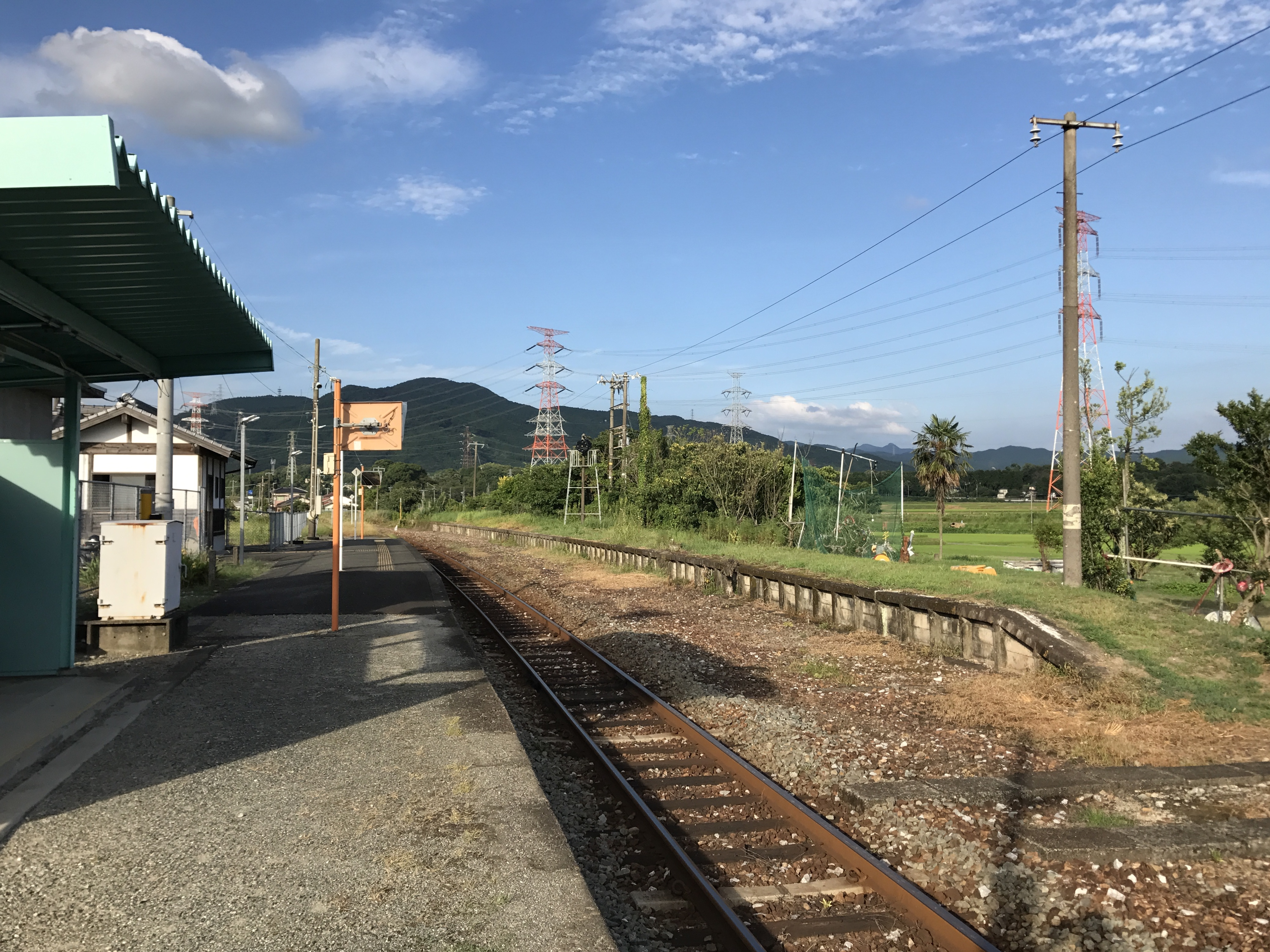 筑前山家駅のホーム(奥は筑前内野方面)